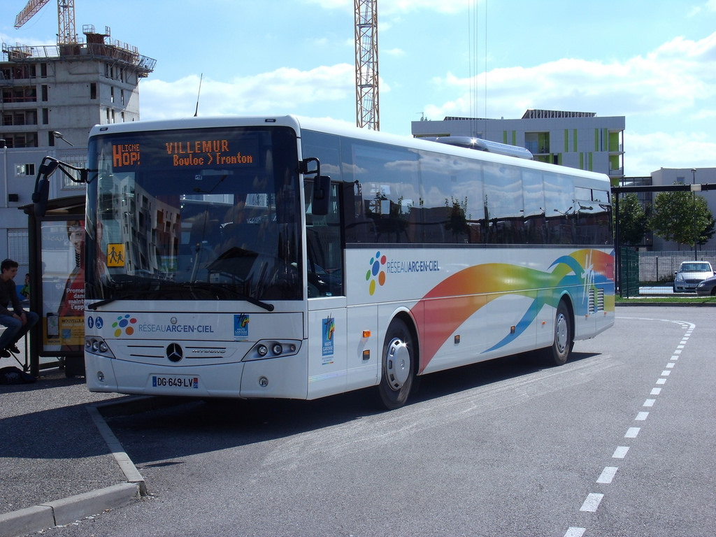 Photo prise à Borderouge